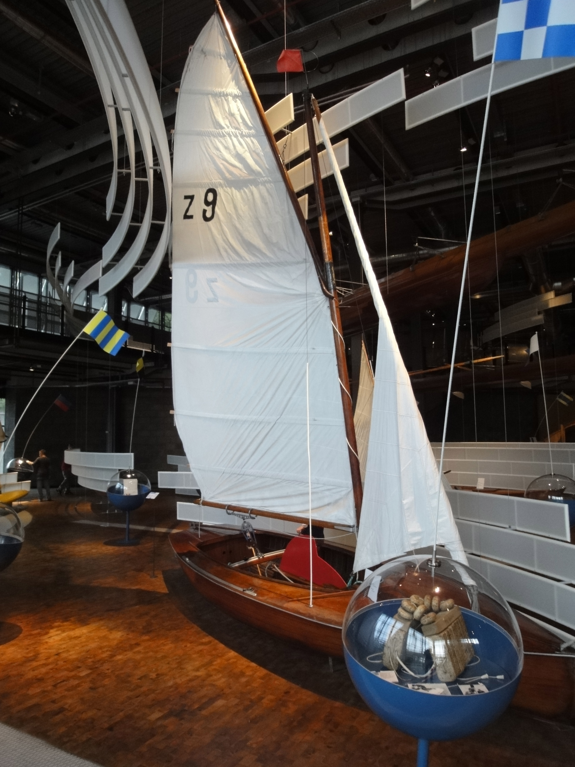 Gaffelgetakelte z-Jolle "Aeolus" im Deutschen Technikmuseum, Berlin